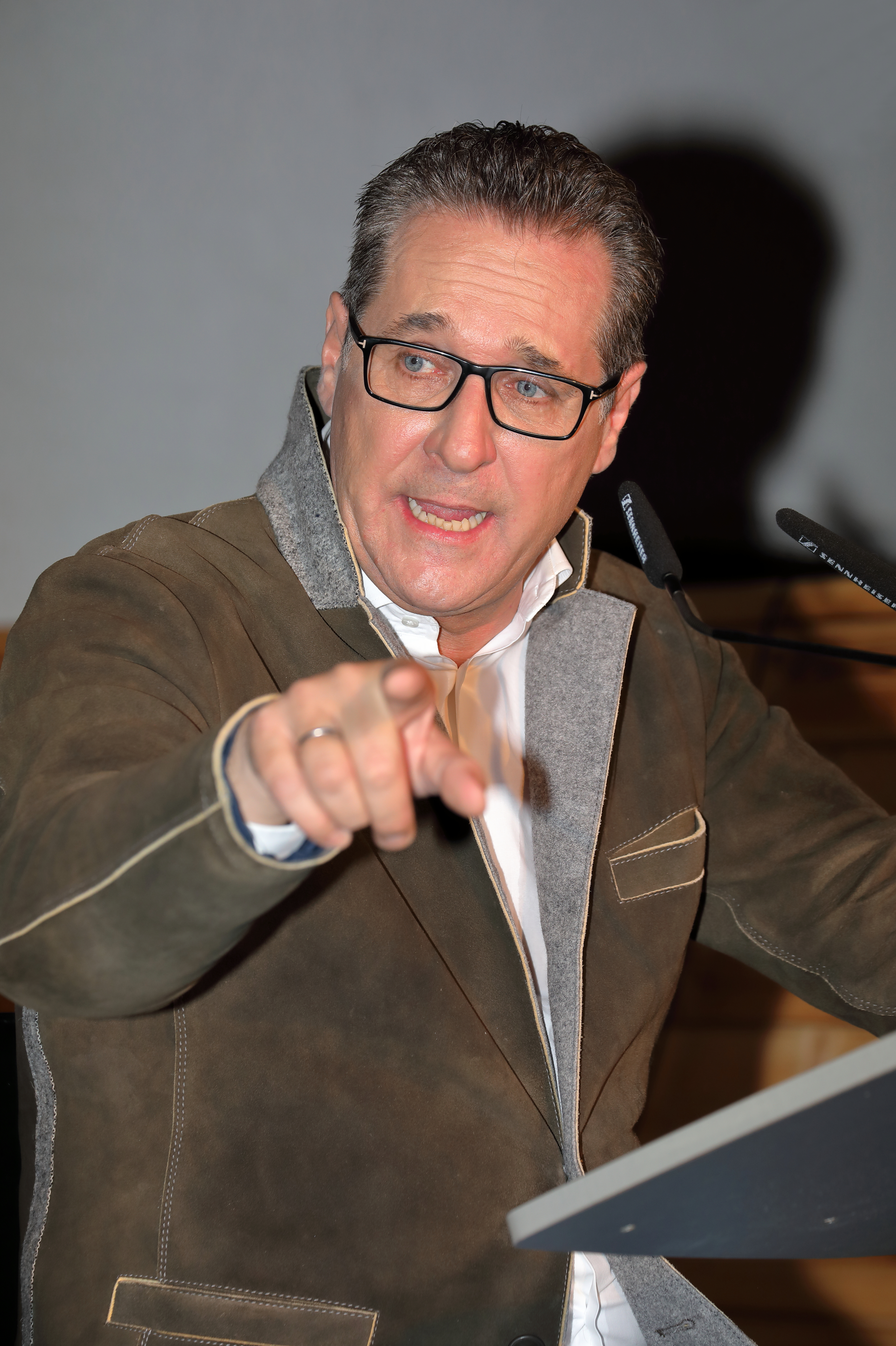 Der ehemalige FPÖ-Politiker Heinz-Christian Strache beim DAÖ-Aschermittwochtreffen 2020 in der Prateralm im Prater im 2. Wiener Gemeindebezirk Leopoldstadt. Bei diesem Treffen gab er erstmals offiziell bekannt, dass er für die Partei DAÖ bei der Wiener Landtags- und Gemeinderatswahl 2020 antreten wird.